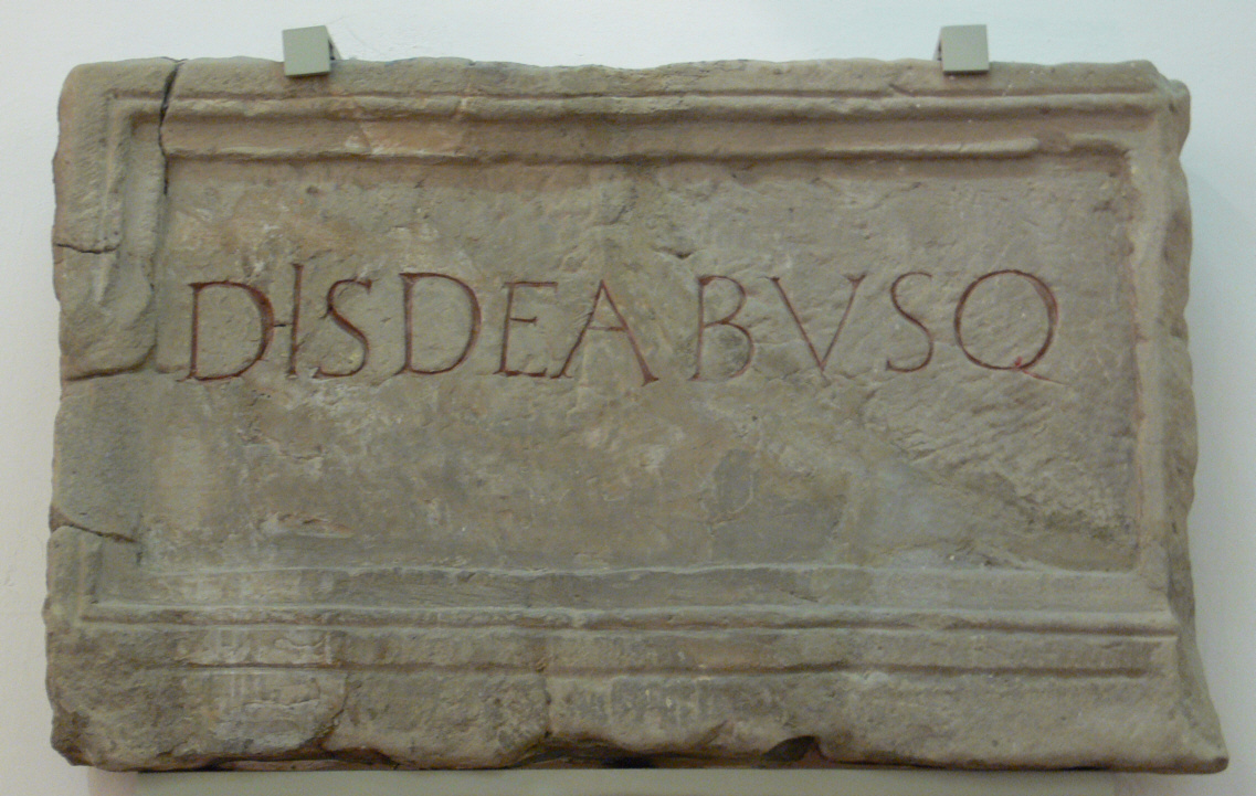 Vorarlberger Landesmuseum, Bregenz Römische Inschrift aus Brigantium CIL III, 11880 DIS DEABVSQ(VE)